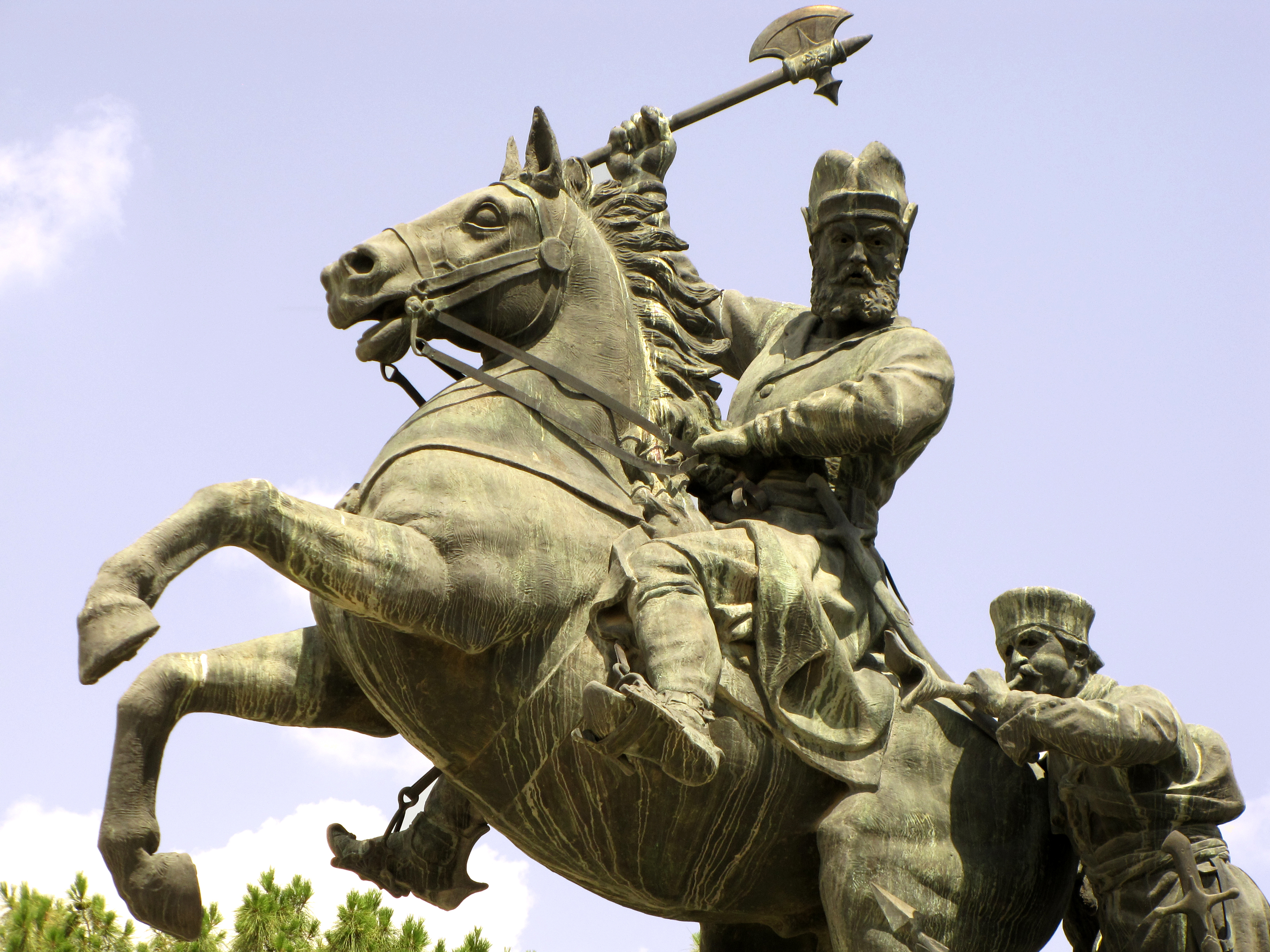 آرامگاه نادرشاه